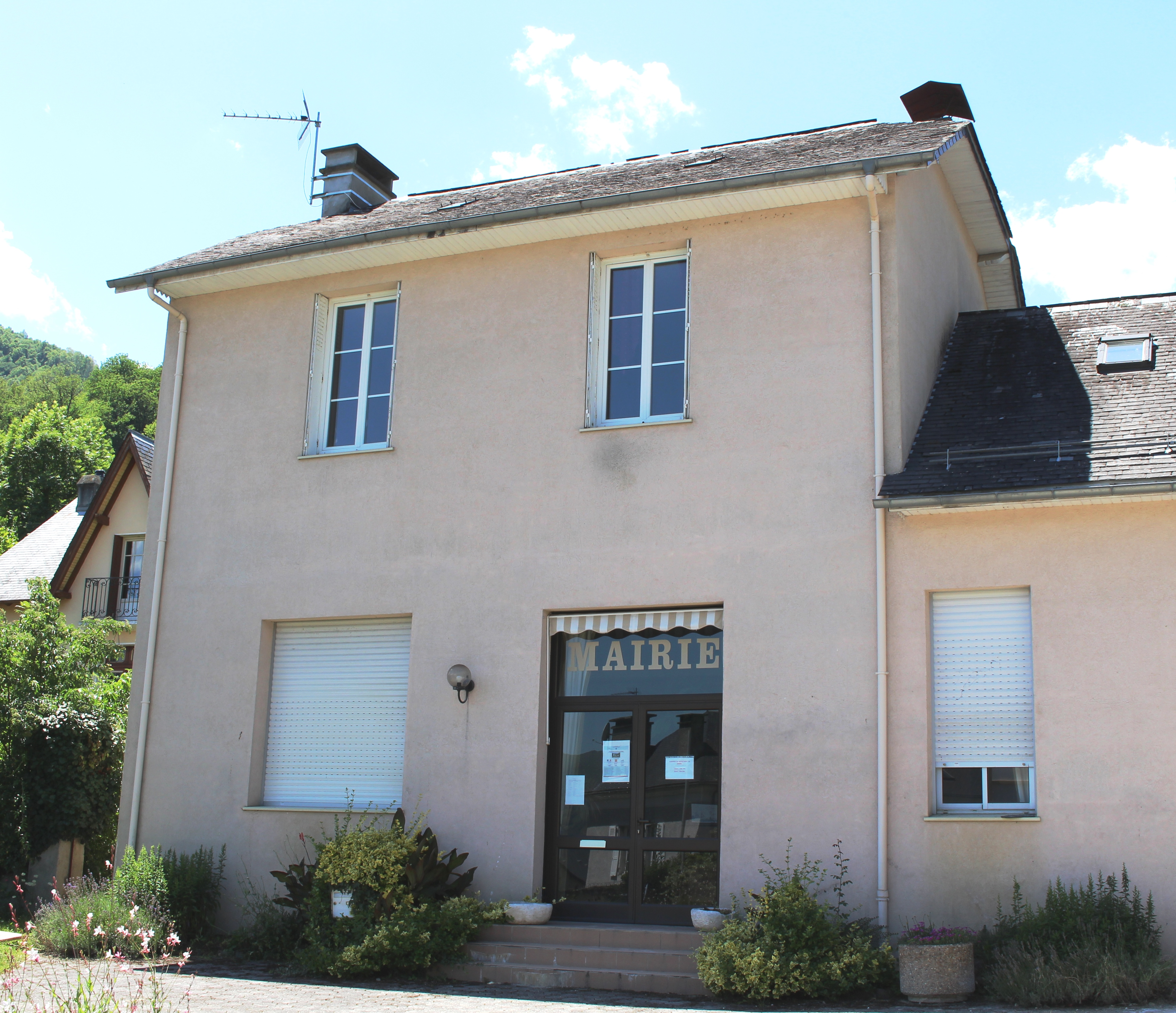 Mairie de Sère-en-Lavedan (Hautes-Pyrénées)